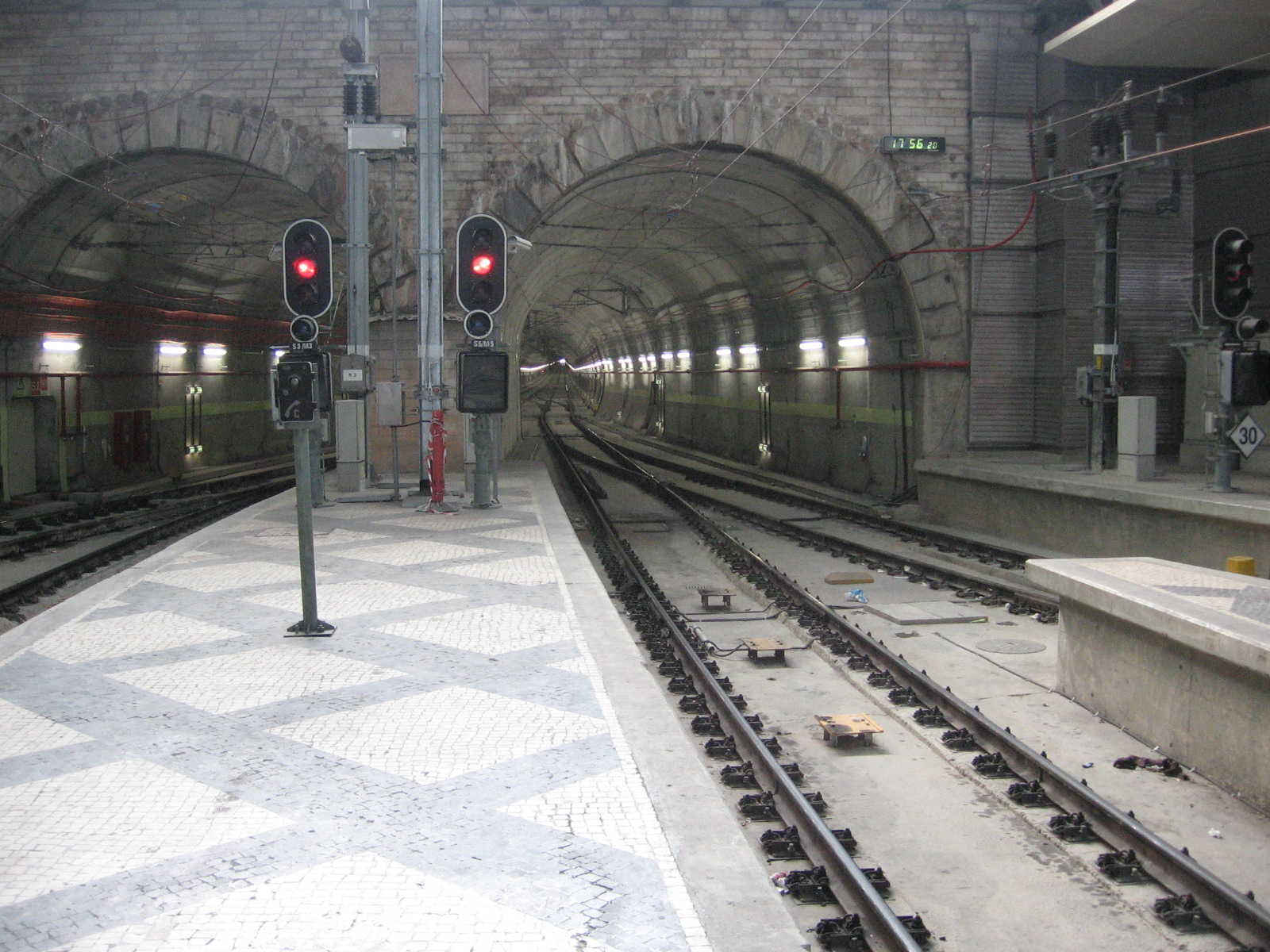 Túnel do Rossio, Estação do Rossio, Lisboa, Portugal